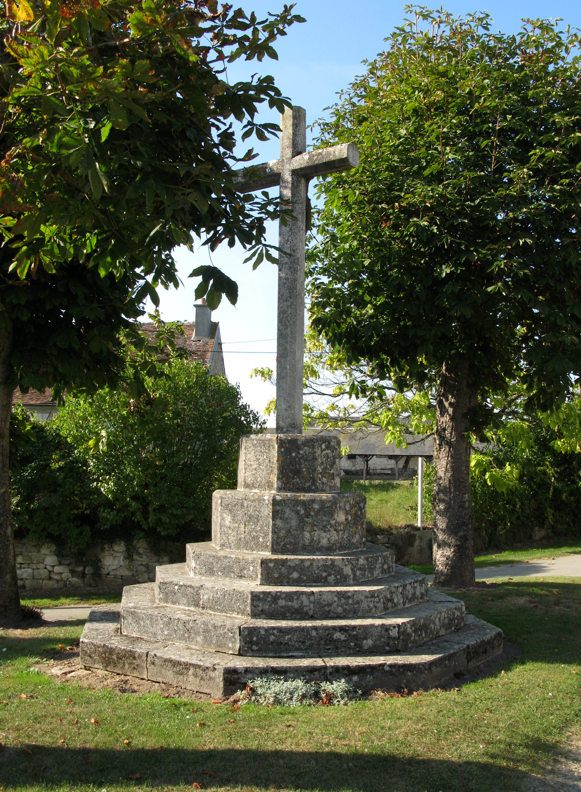 Parcy-et-Tigny (Aisne, France) - Le calvaire de Parcy. . .